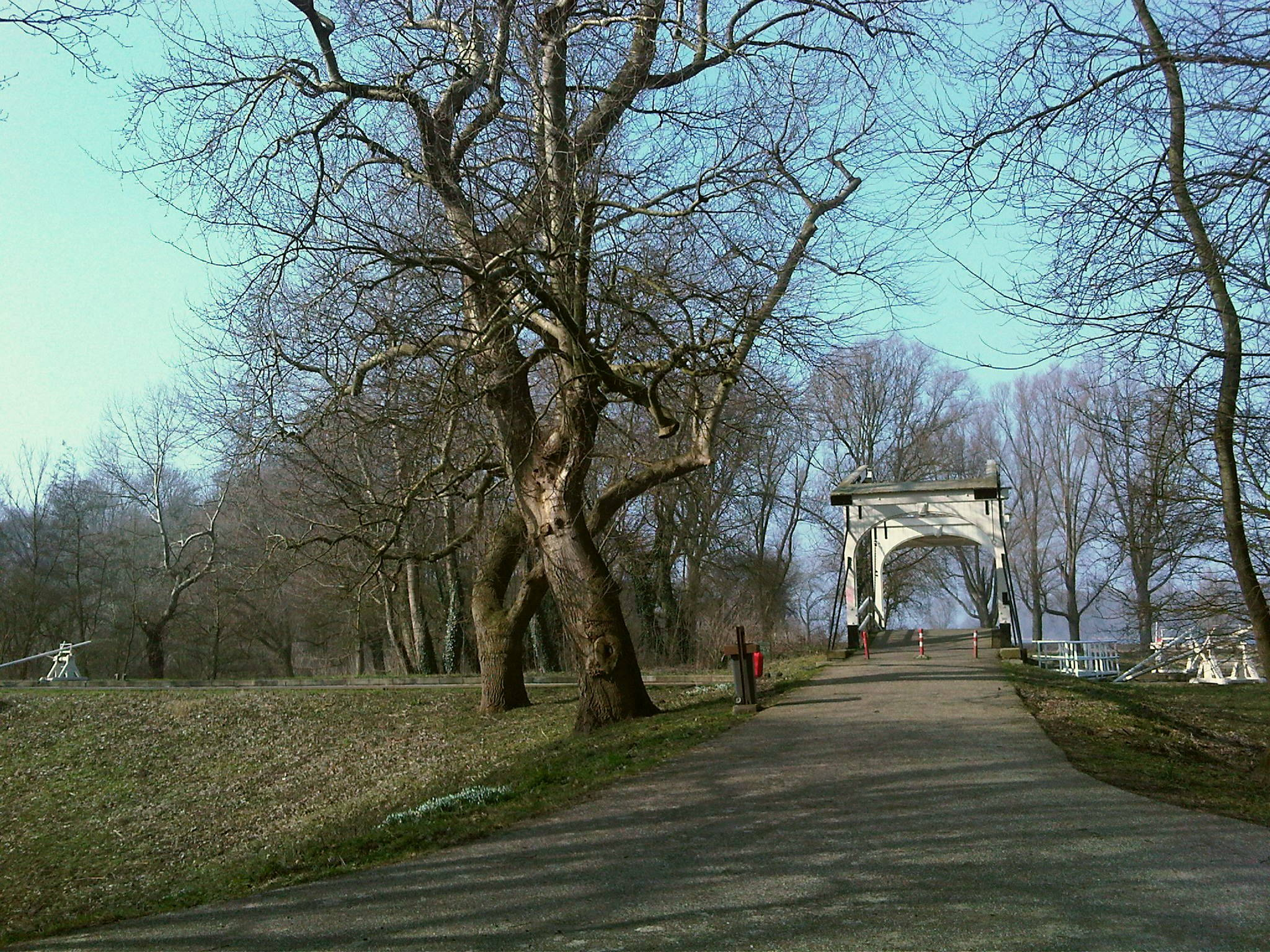 Eigen gemaakte foto, bewerkt met PSP